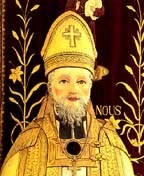 Photo du buste de Saint Patern de Vannes en la Cathédrale de Vannes